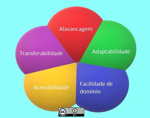 Imagem ilustrando os pilares da internet generativa.